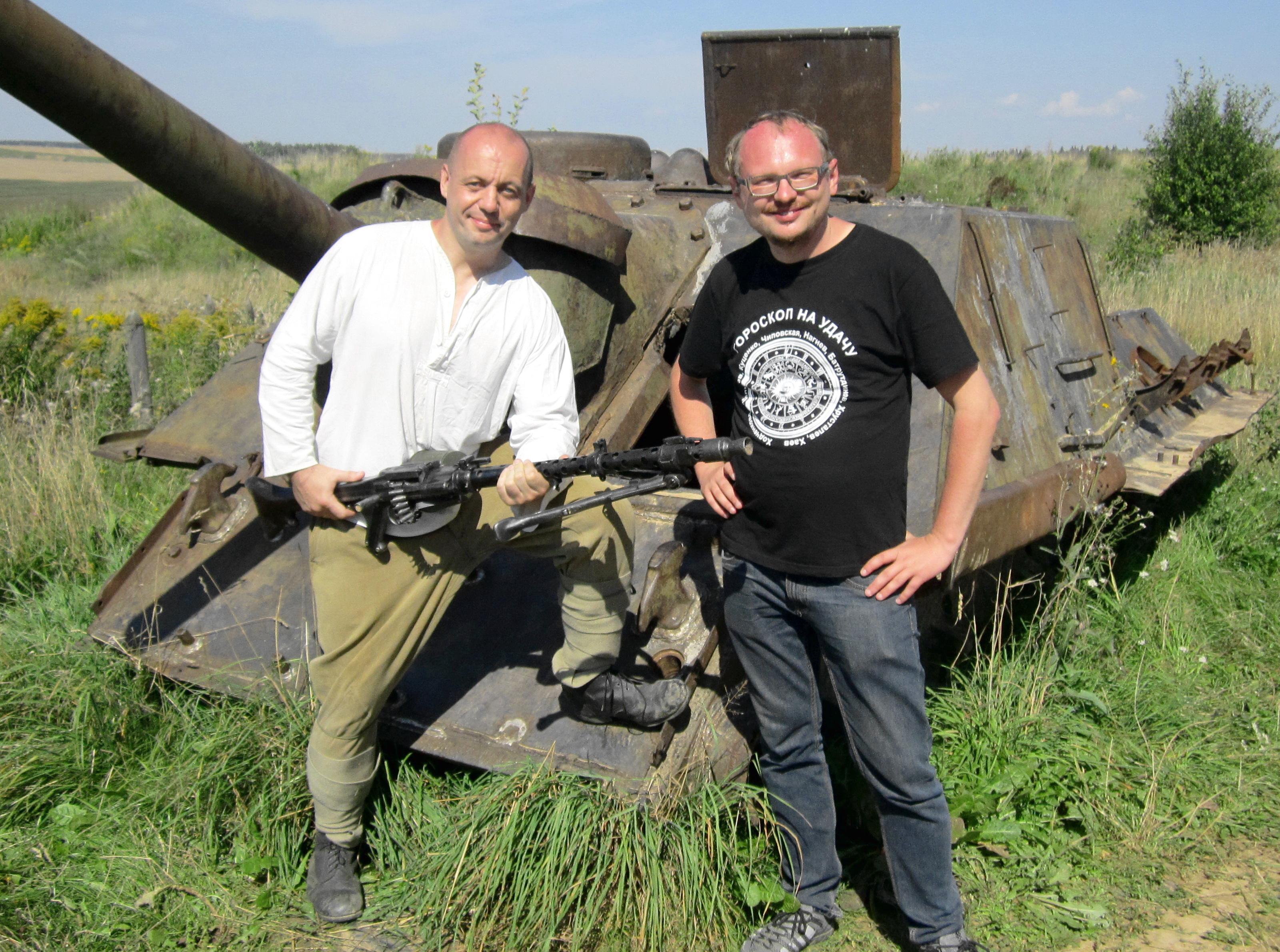 Здымкі фільма «PARTY-zan фільм». Алег Грушэцкі разам з рэжысёрам Андрэем Курэйчыкам